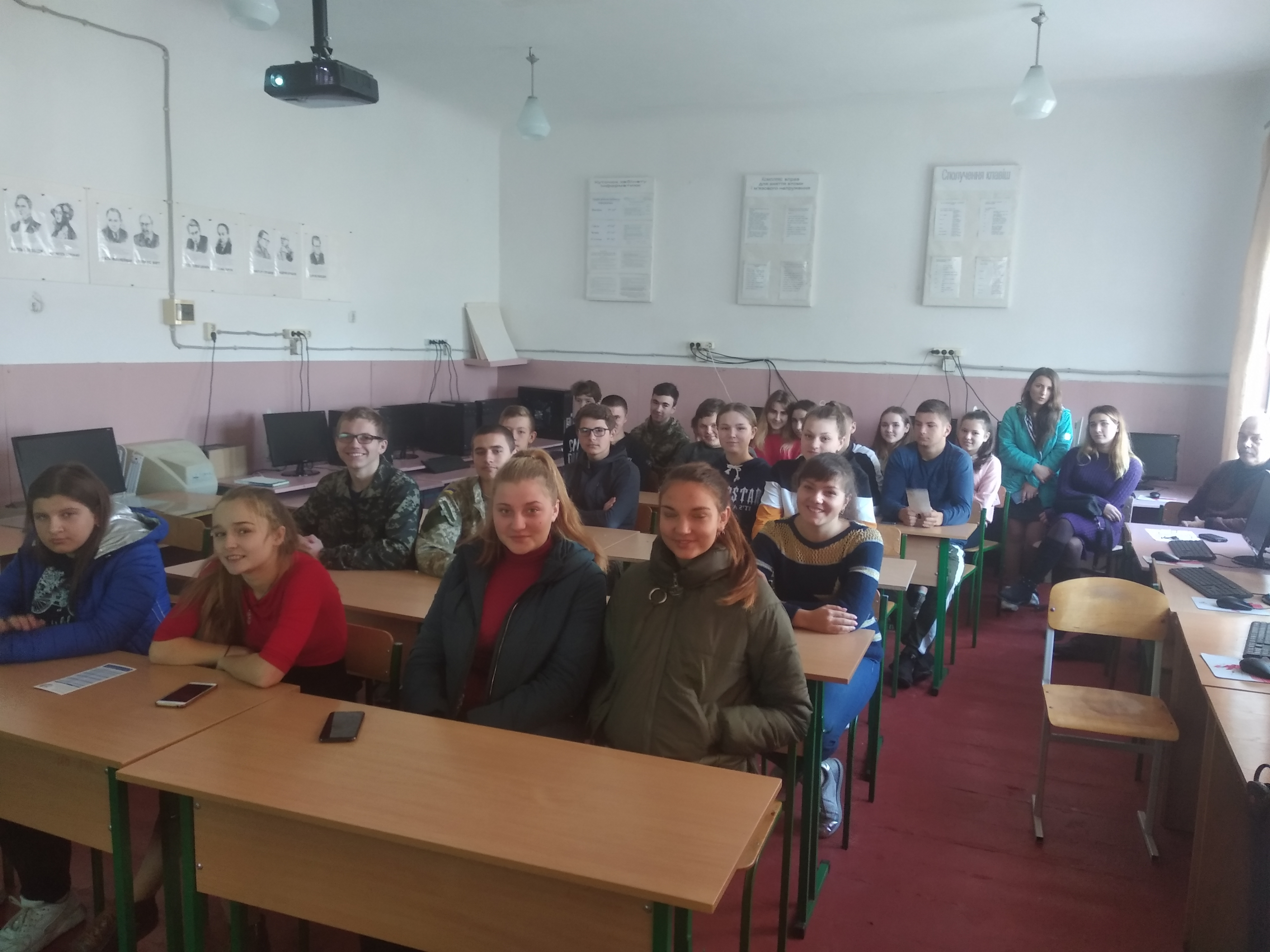 Вікі-урок У Носівській ЗОШ I-III ст. №2, жовтень 2019